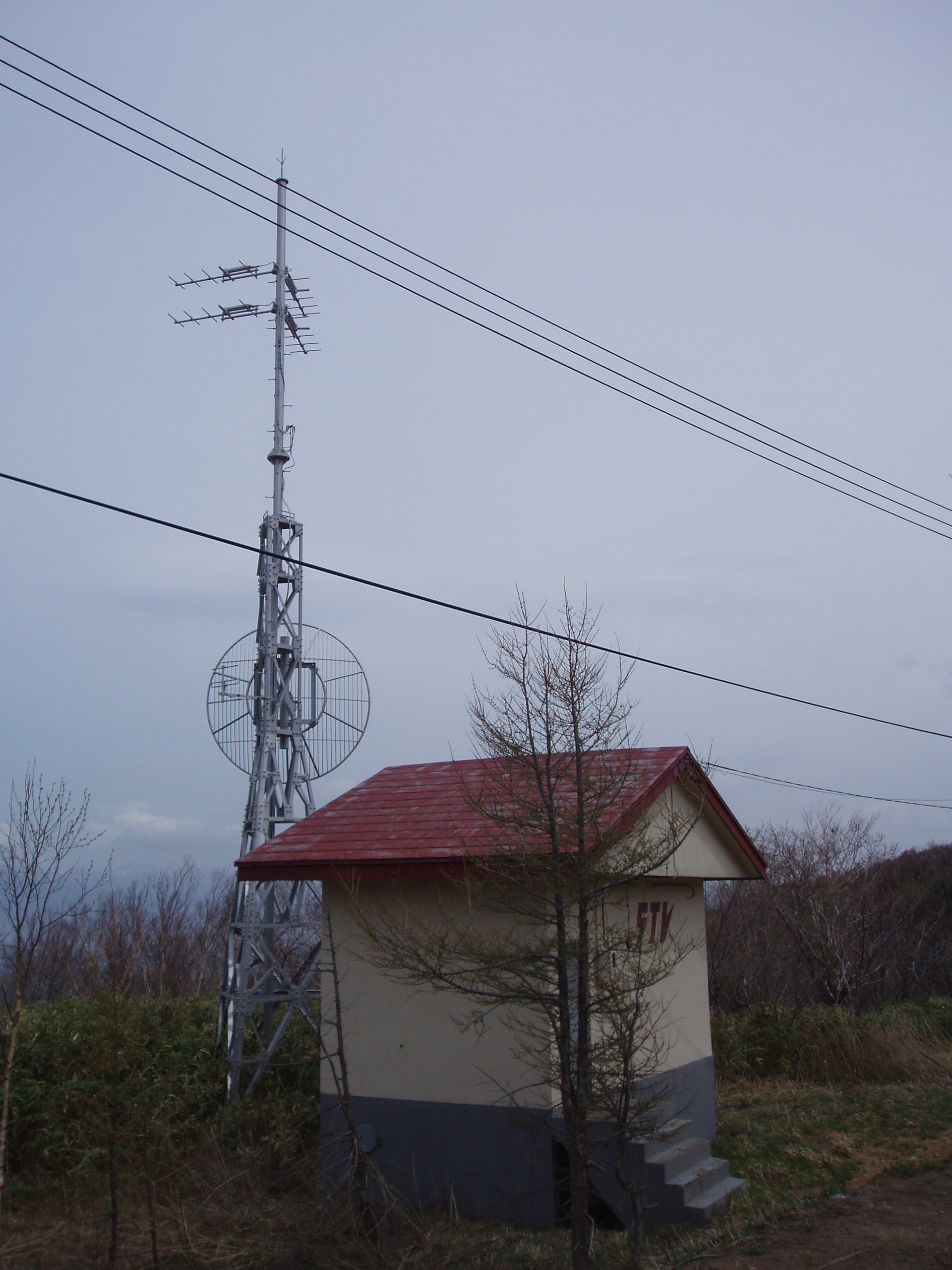 岩内中継局 STV送信設備（アナログ）